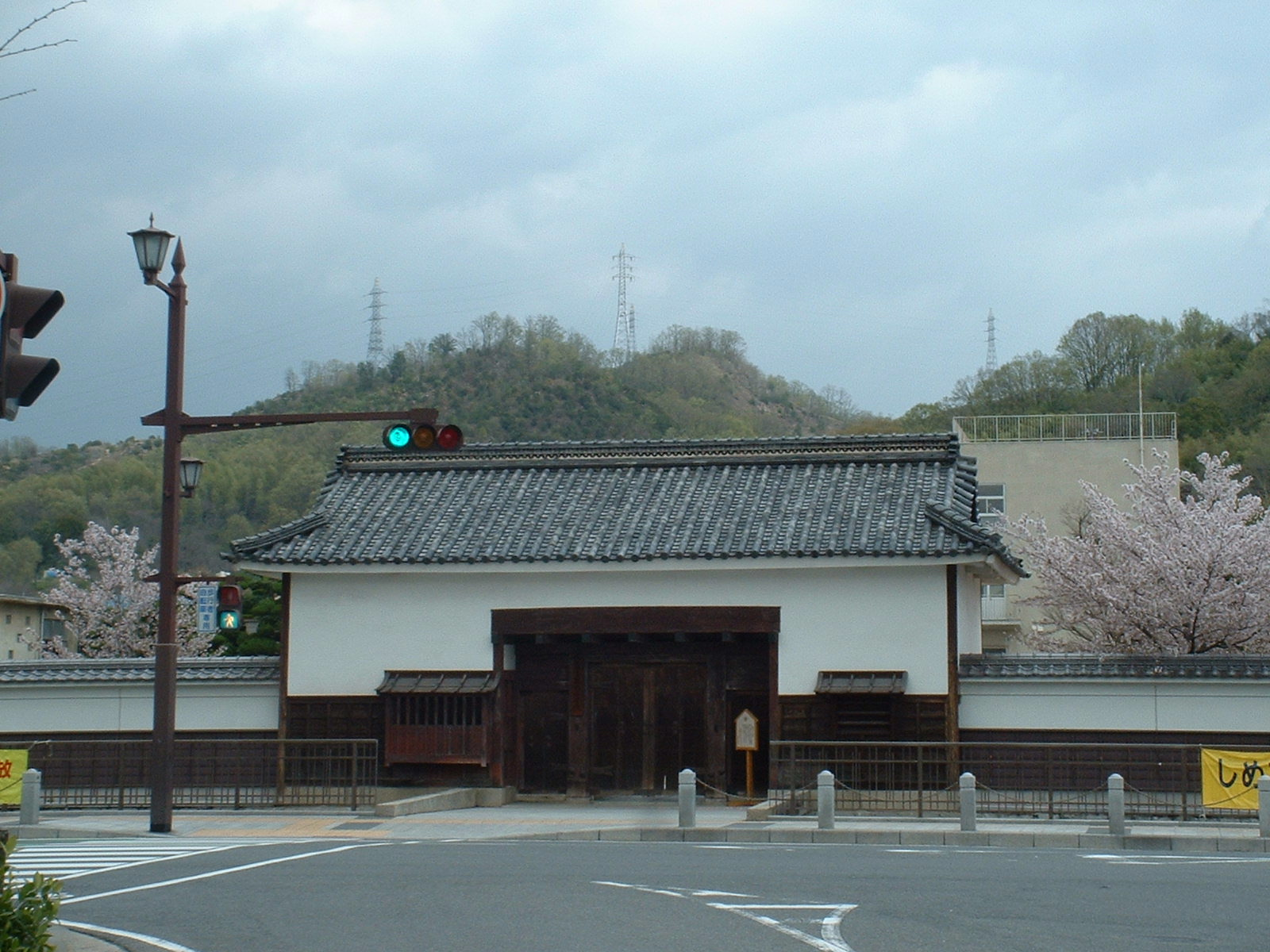 Oda Kentyom-gate(Kasaoka-shi, Okayama Japan) April, 2006. A contributor photographs it